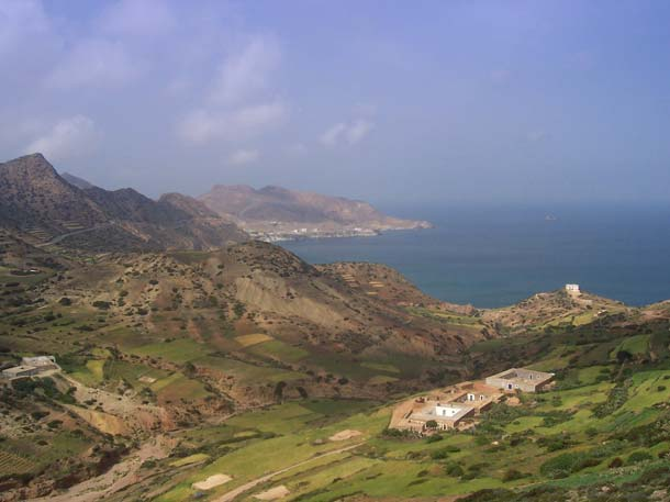 Cap des Trois Fourches - avril 2006